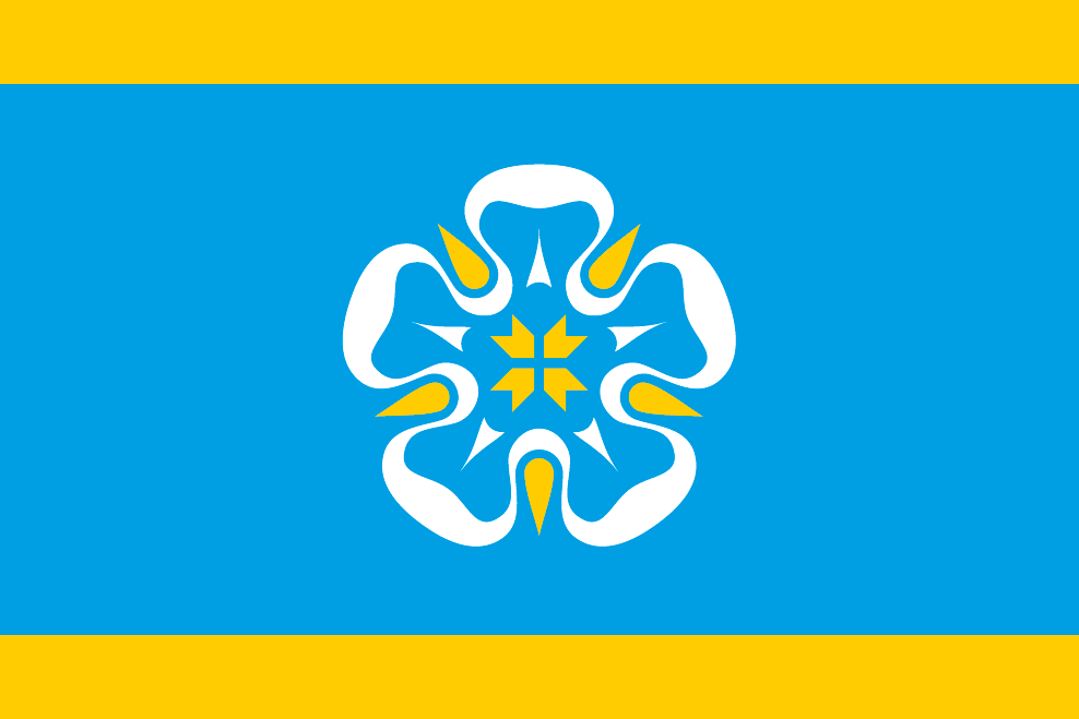 Viljandi valla lipp